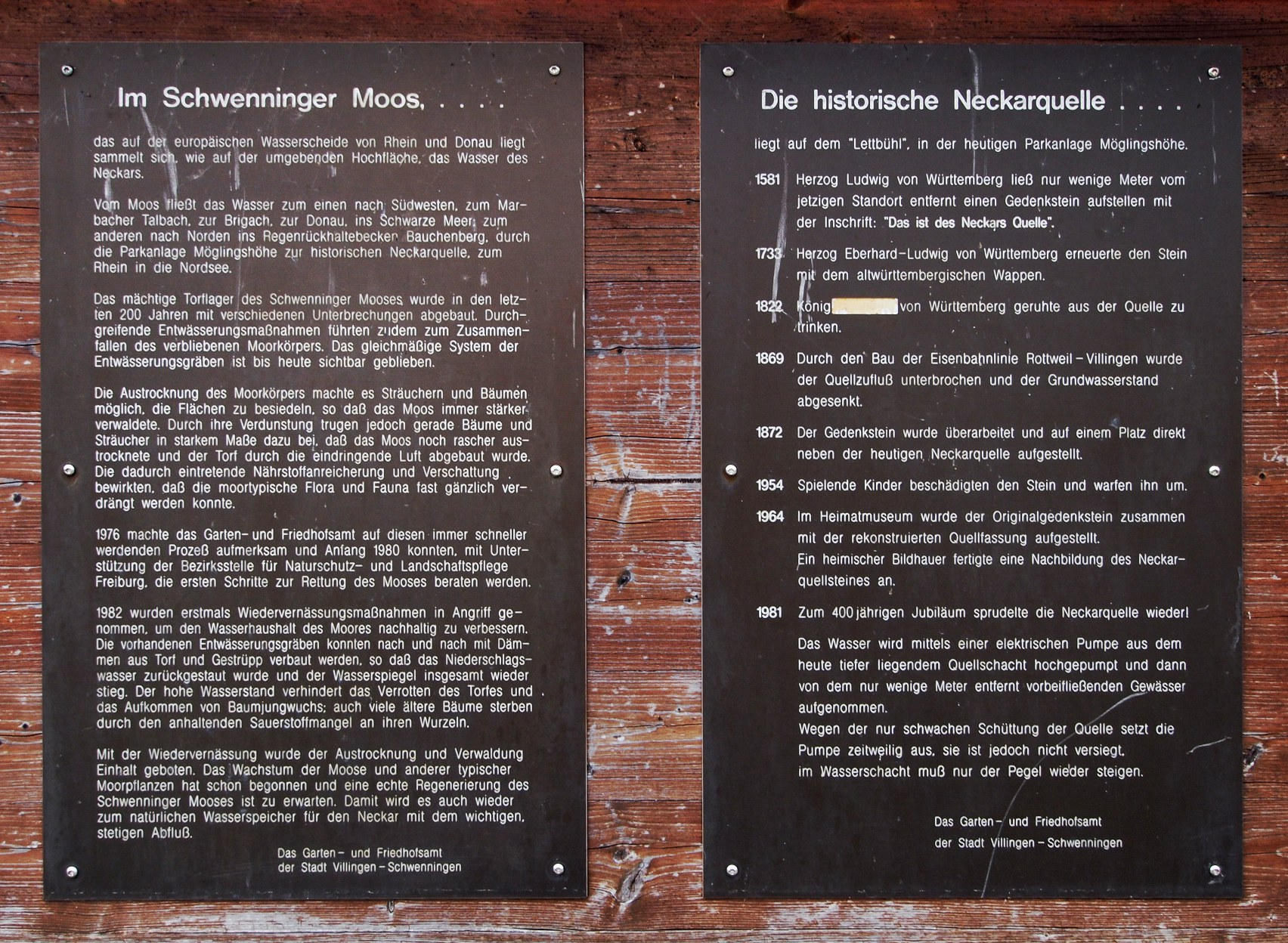 Informationstafeln am Neckar-Ursprung im Schwenninger Moos